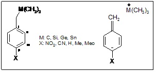 Série de substancias variando grupos doadores (M) e retiradores (X).